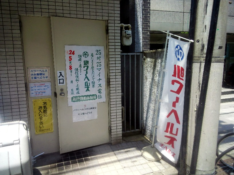 パワーへルス会場 2014年